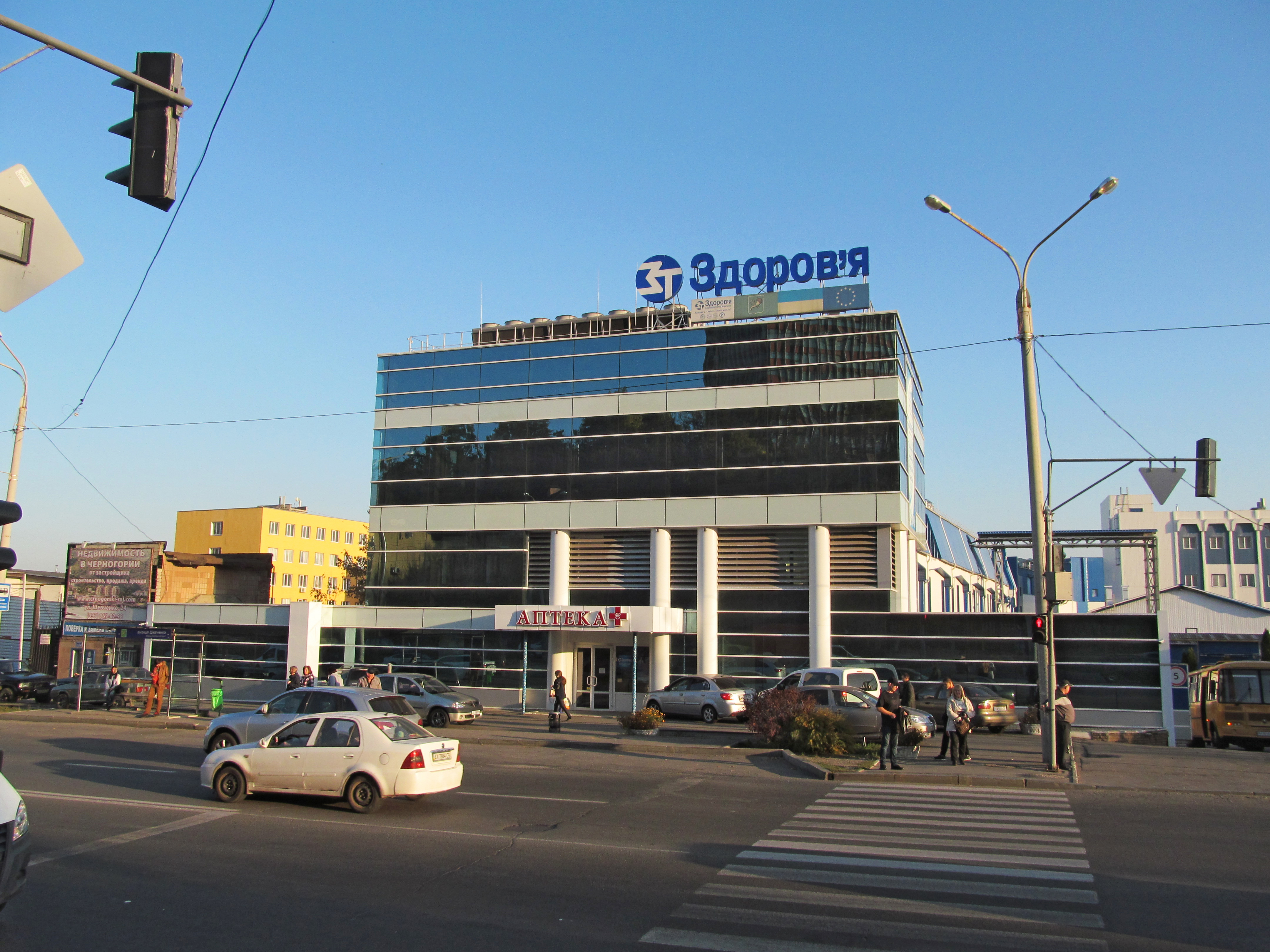 Харківське фармацевтичне підприємство «Здоров'я народу», вул. Шевченка, 22